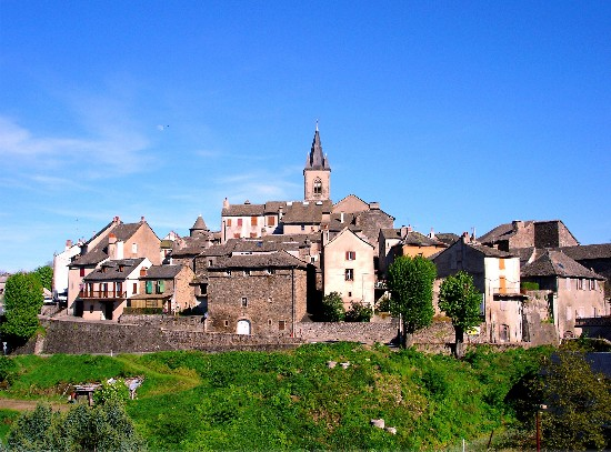 Salles-Curan, près du lac de Pareloup